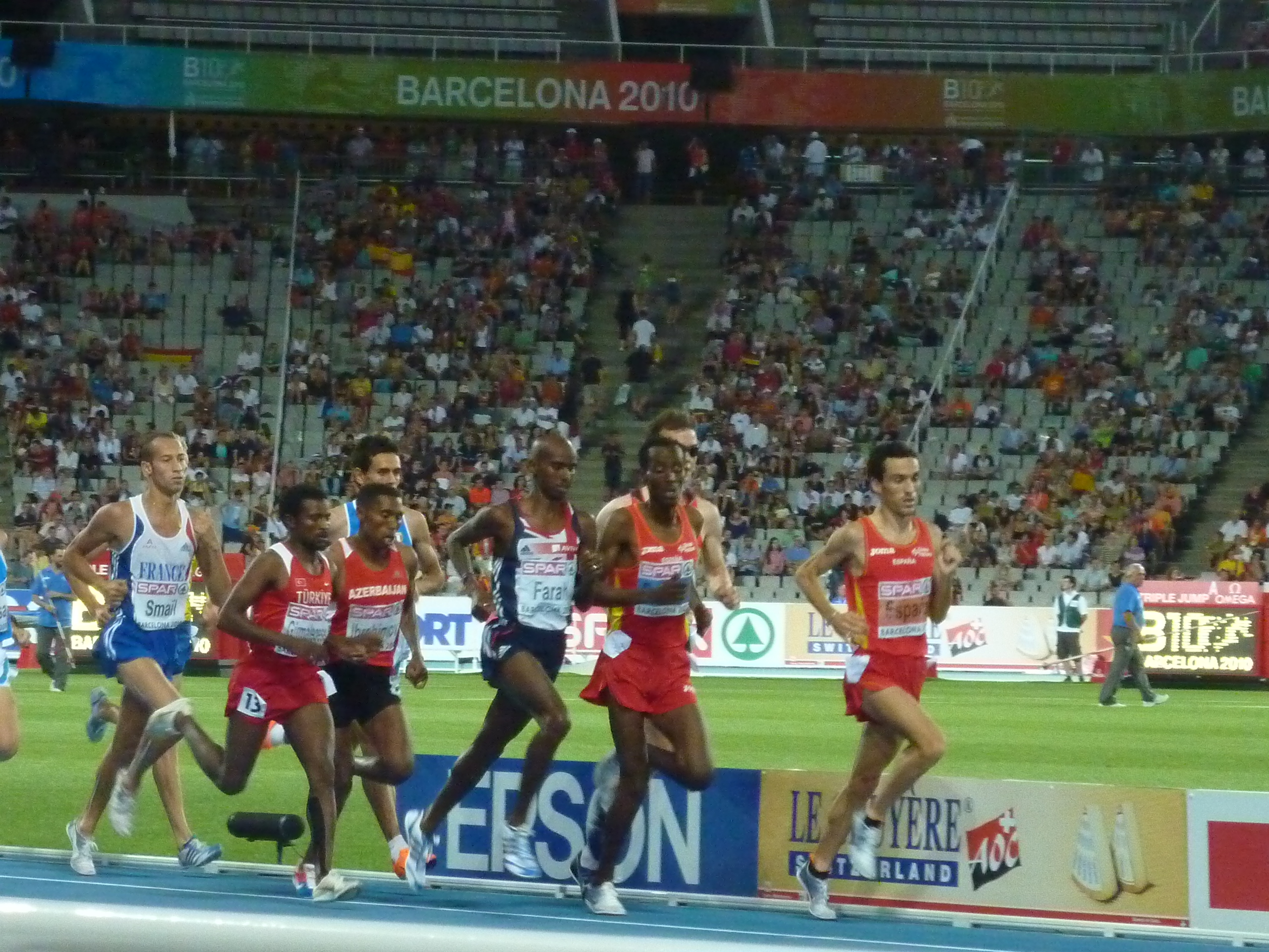 5000m final